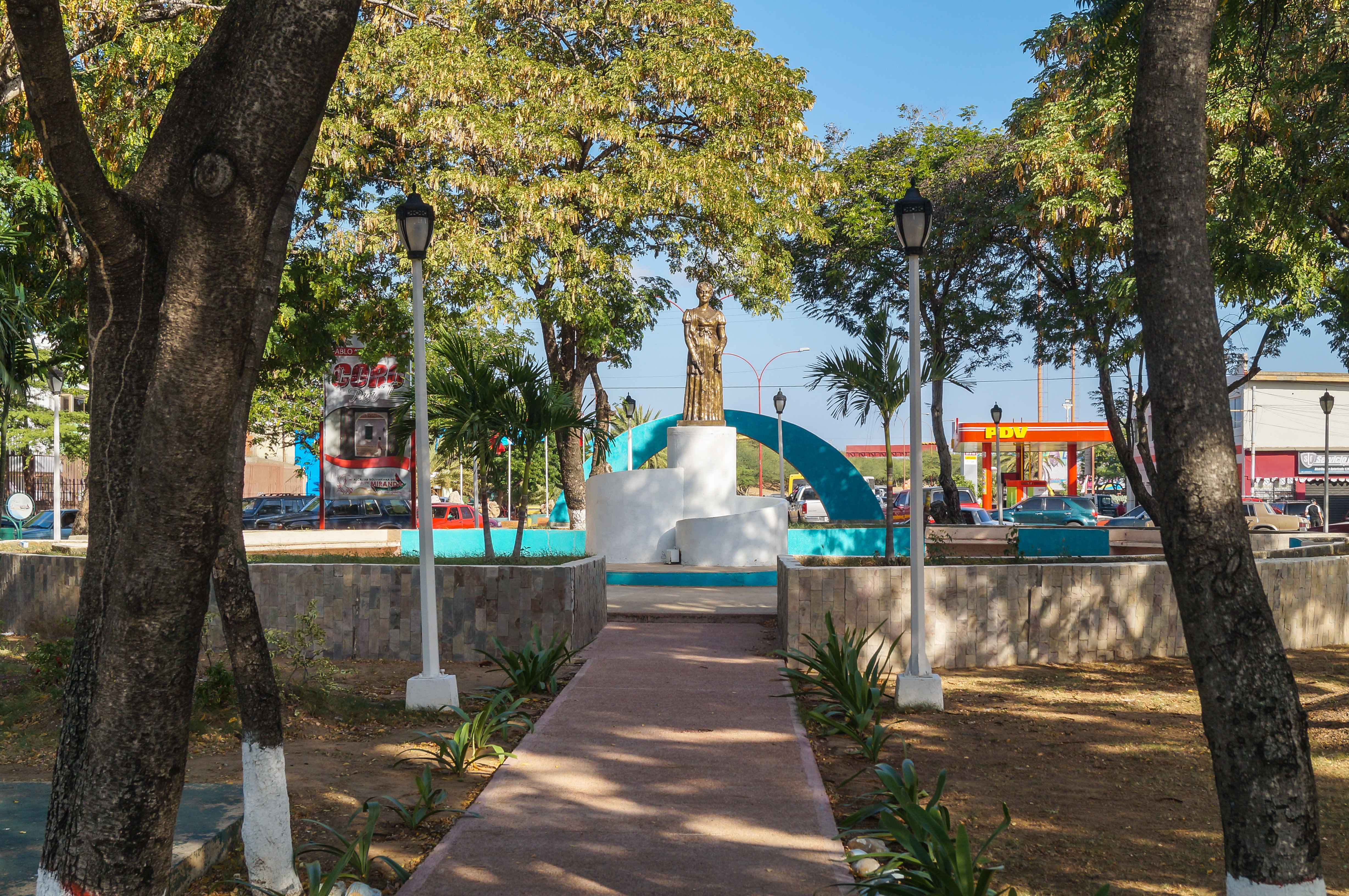 Se encuentra ubicada en la calle Concordia con avenida Los Médanos. También conocida como plaza Josefa Camejo, es un sitio urbano. Está ubicada en la salida de Coro hacia la península de Paraguaná. Su planta es circular, posee bancos de cemento, árboles y una estatua de cuerpo entero que representa a Josefa Camejo. Coro. Estado Falcón.